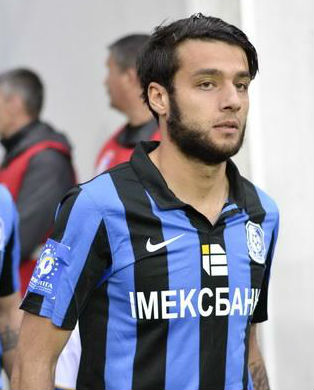 Торніке Окріашвілі перед матчем з київським Динамо, 25 квітня 2014 року